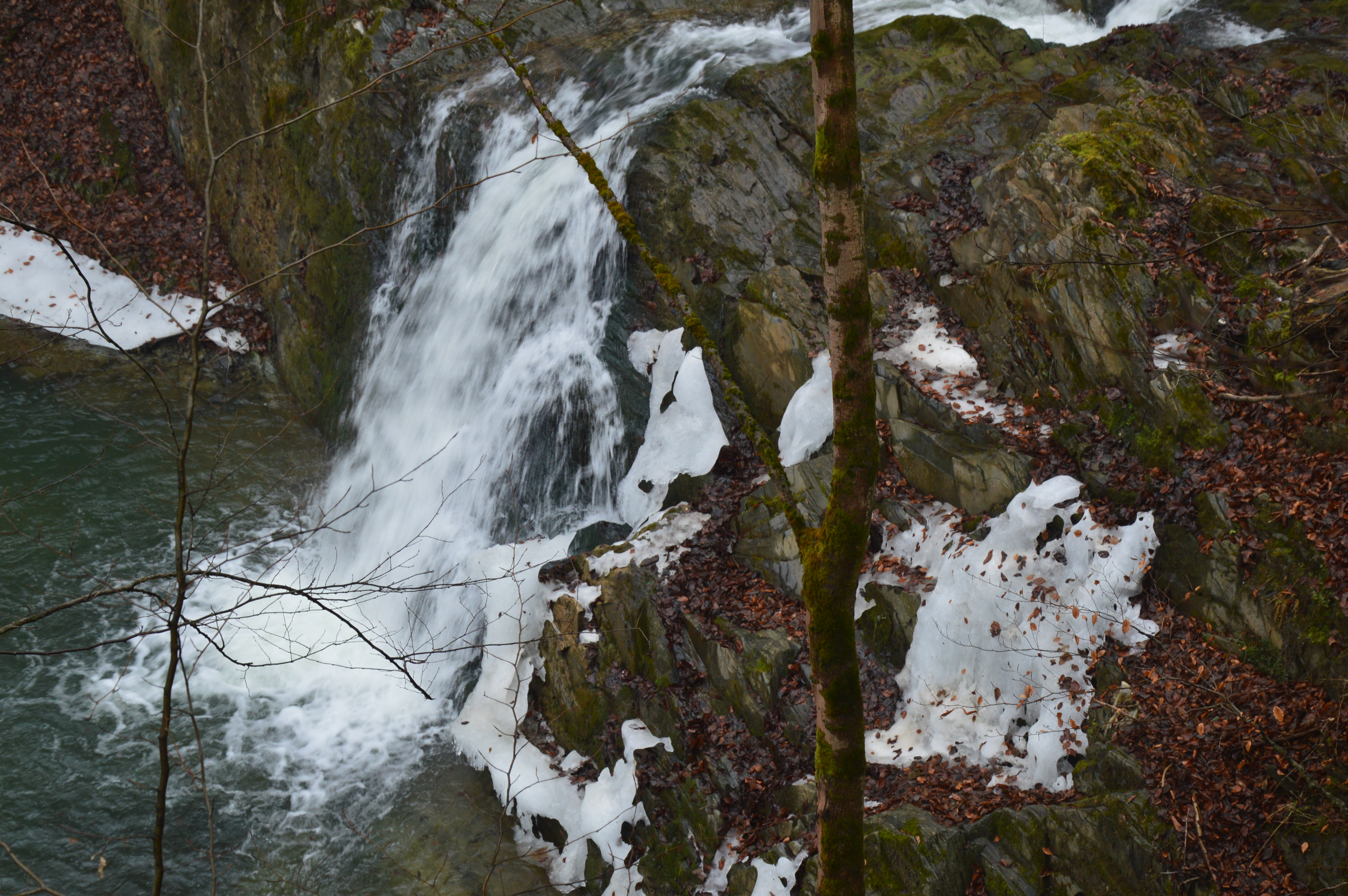 «Гуцульщина», Косівський район